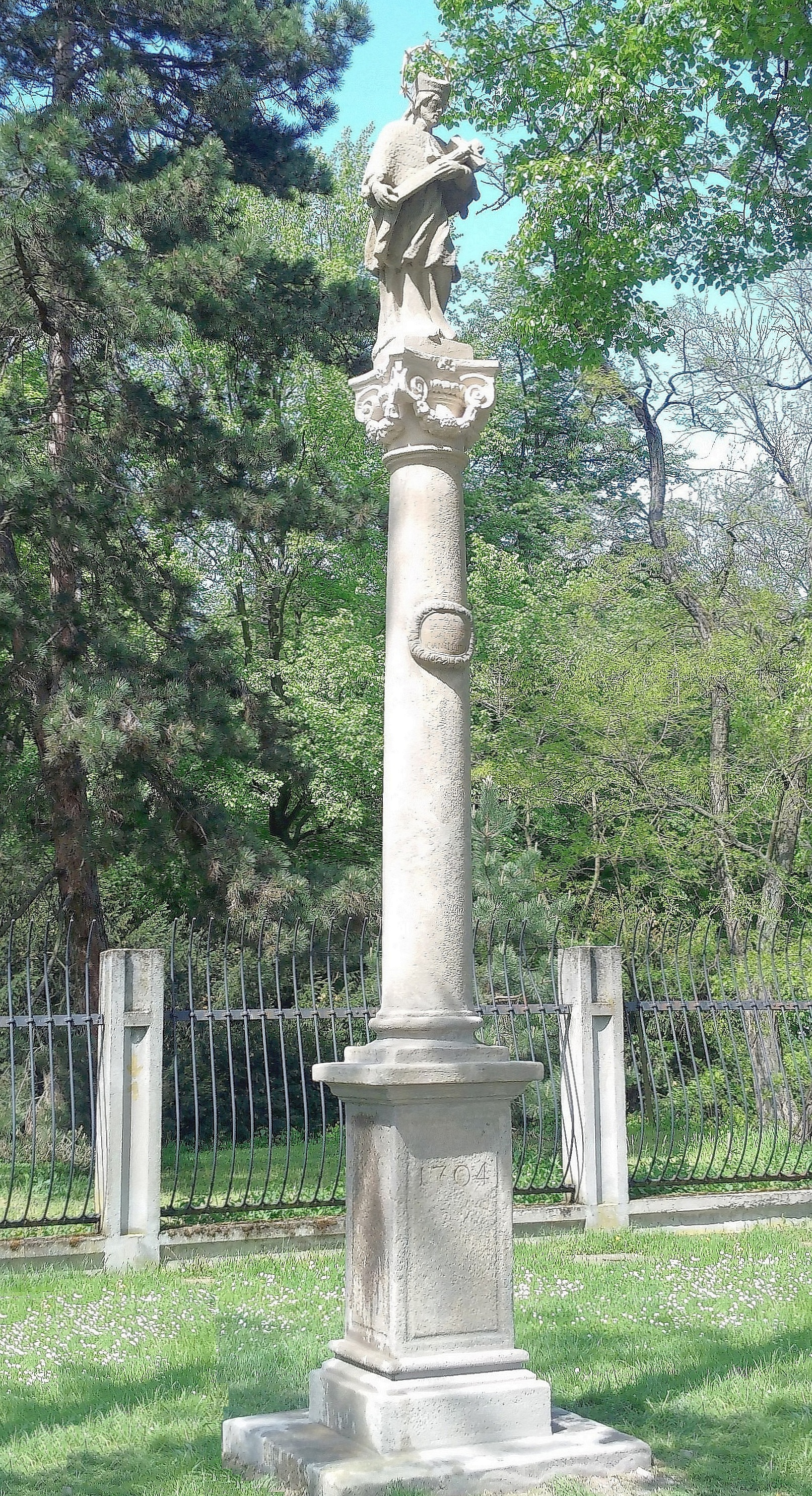 Sloup se sochou svatého Jana Nepomuckého, u mostu, pp. 3117/5, Kroměříž.